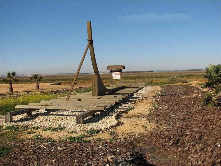 Foto del puerto histórico de Moguer. Vista de astilleros de la Carabela La Niña. Recreación de los astilleros en el Antiguo Puerto de Moguer.